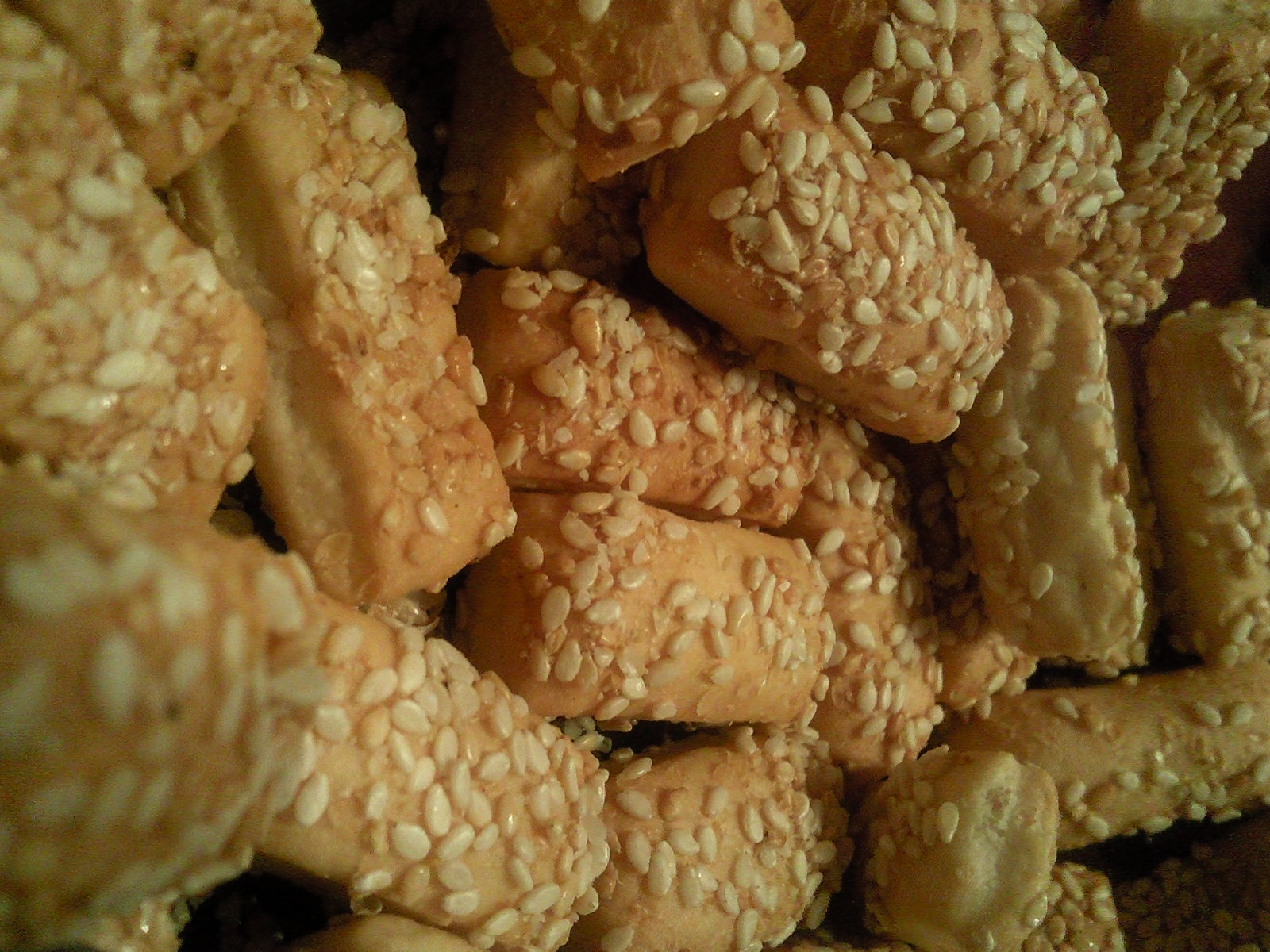 Хлебные палочки с кунжутом